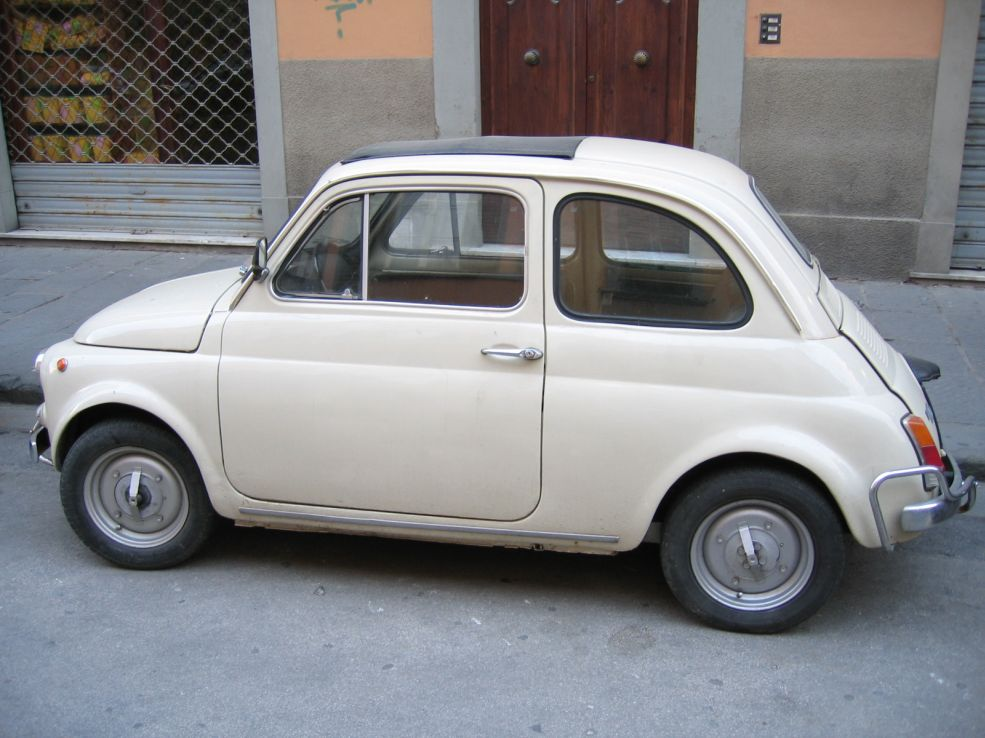 Une Fiat 500 dans les rues de Pise. (Dimanche 23 mai 2004, 20:36)